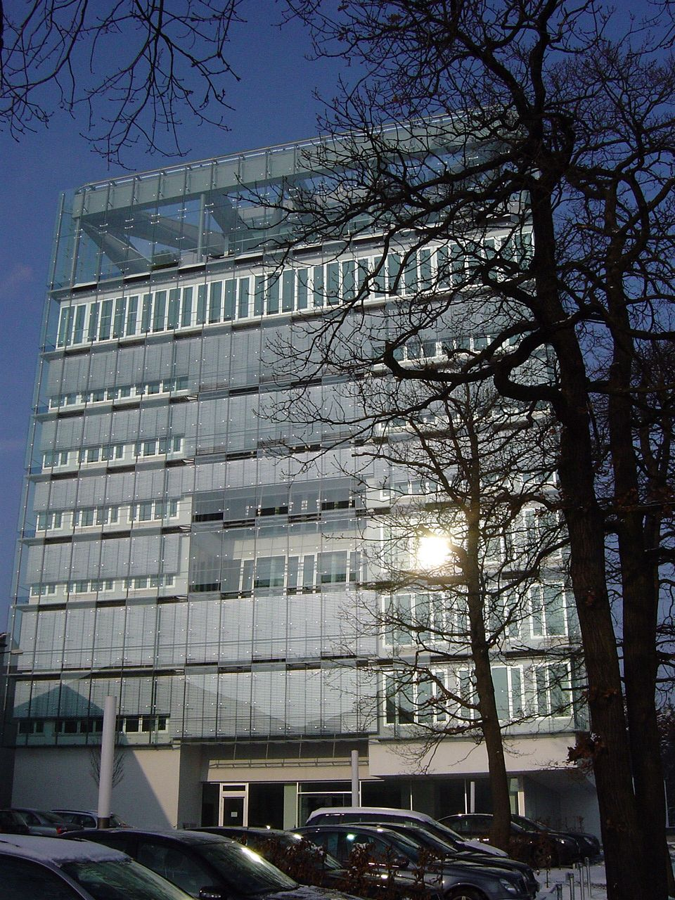 Hauptverwaltungsgebäude der Firma Dorma in Ennepetal